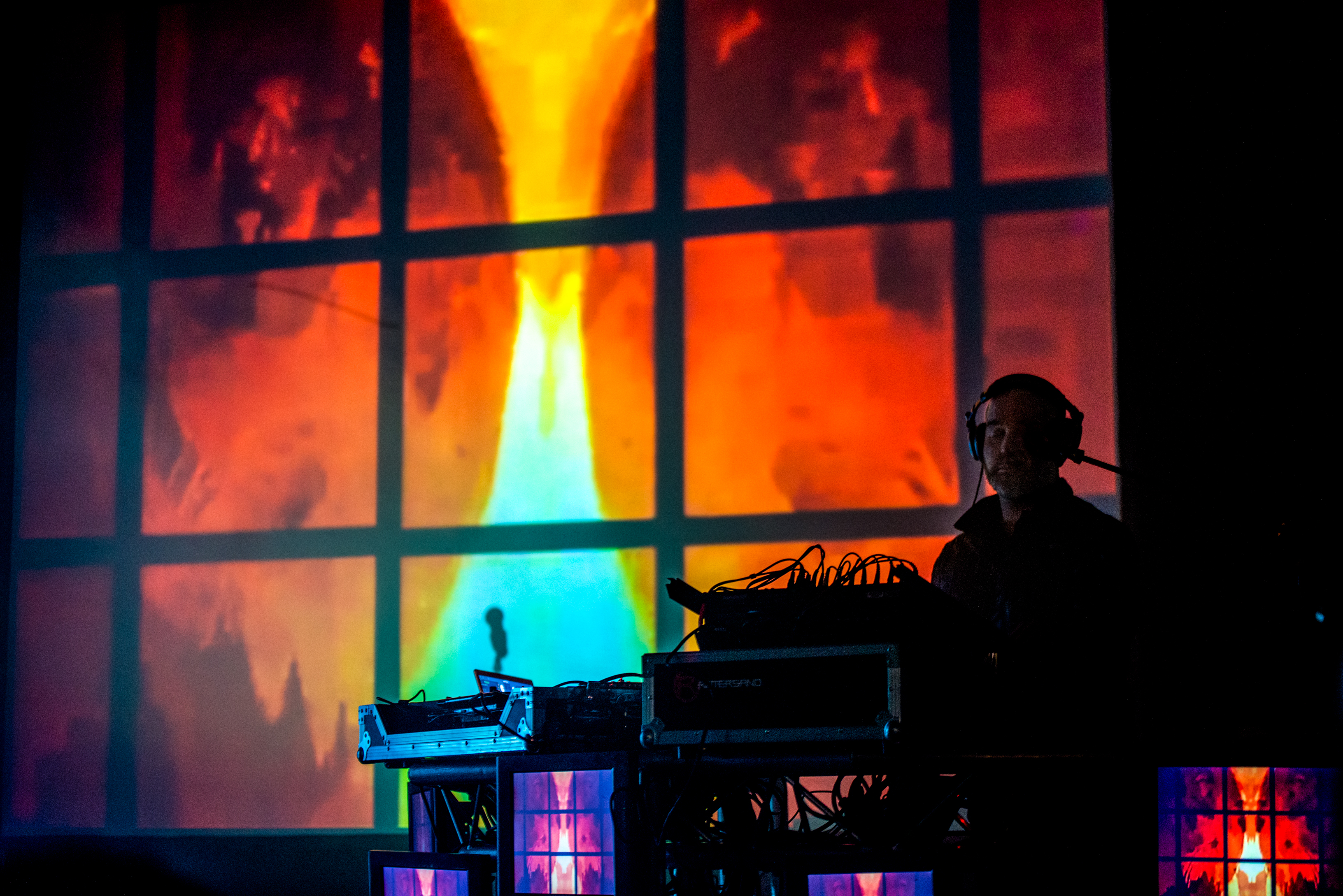 de Die Band Rotersand beim e-tropolis 2014 in Oberhausen